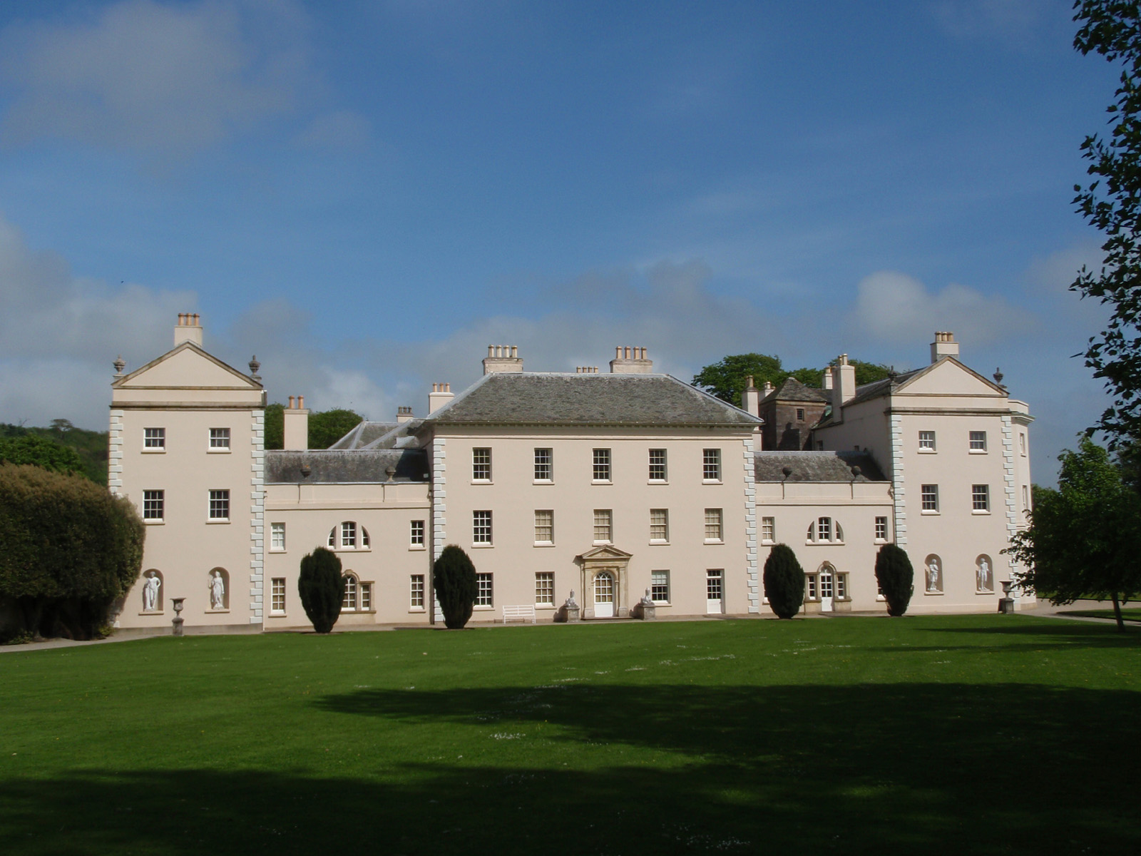 Saltram House - Splendid!